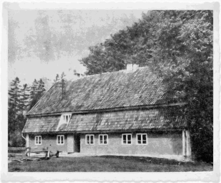 Brzezina - dwór z 1759